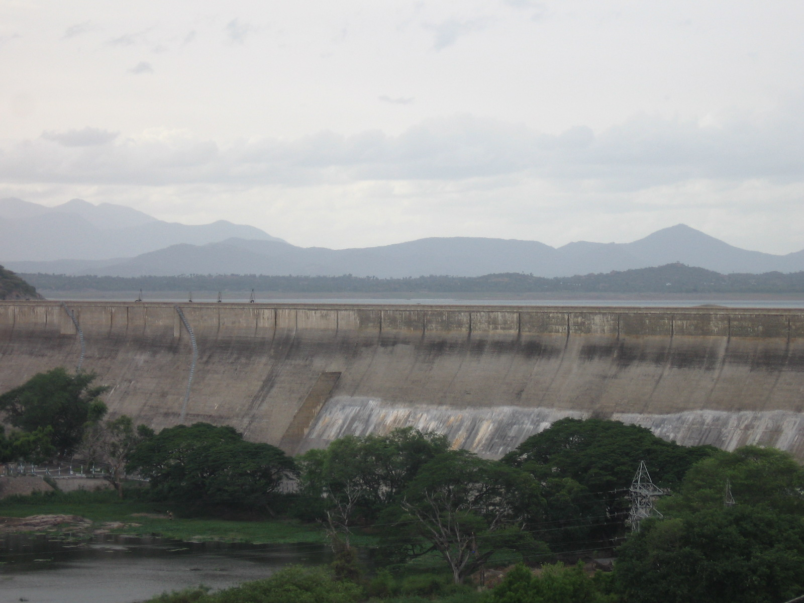 Mettur Dam